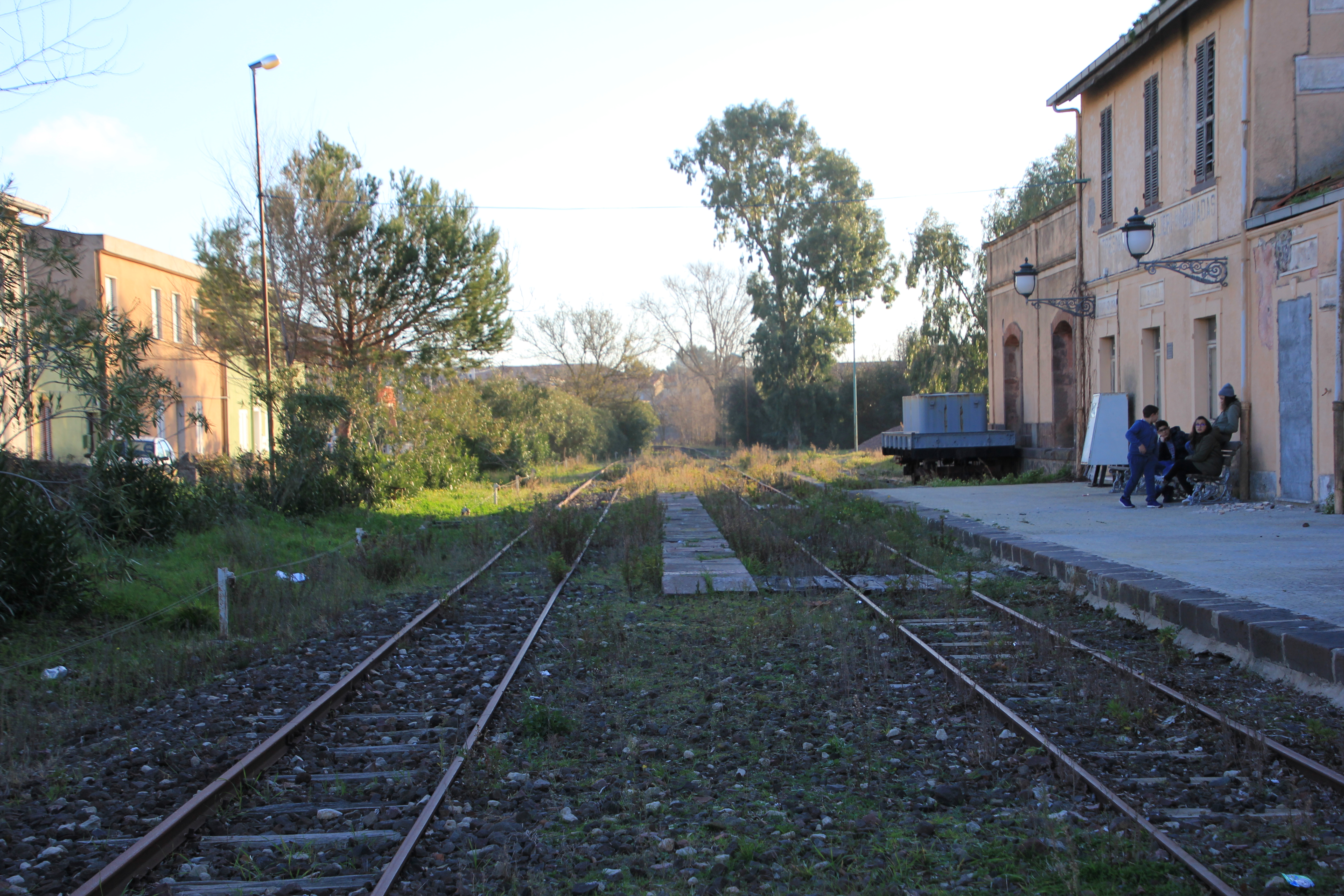 Tresnuraghes, stazione ferroviaria